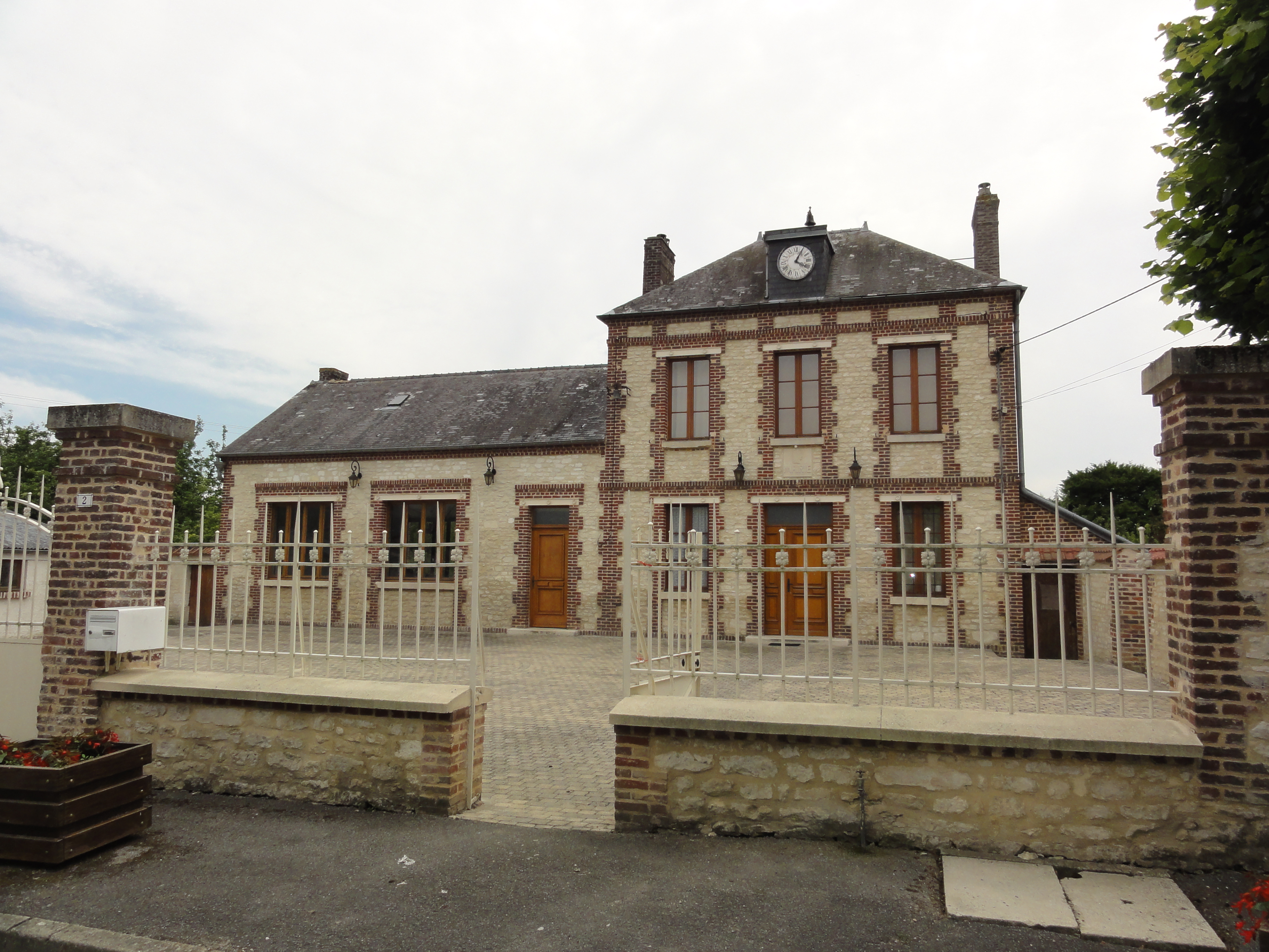 Sainte-Preuve (Aisne) mairie